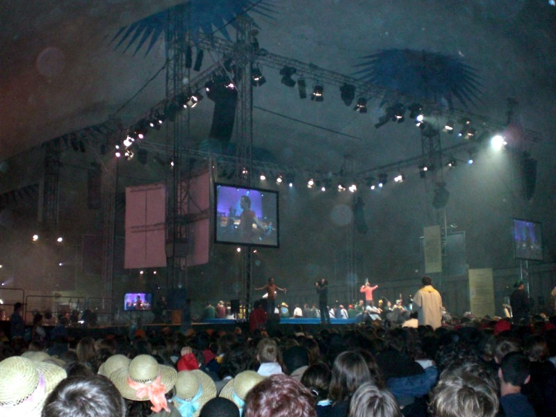 Photo du chapiteau au Frat 2007